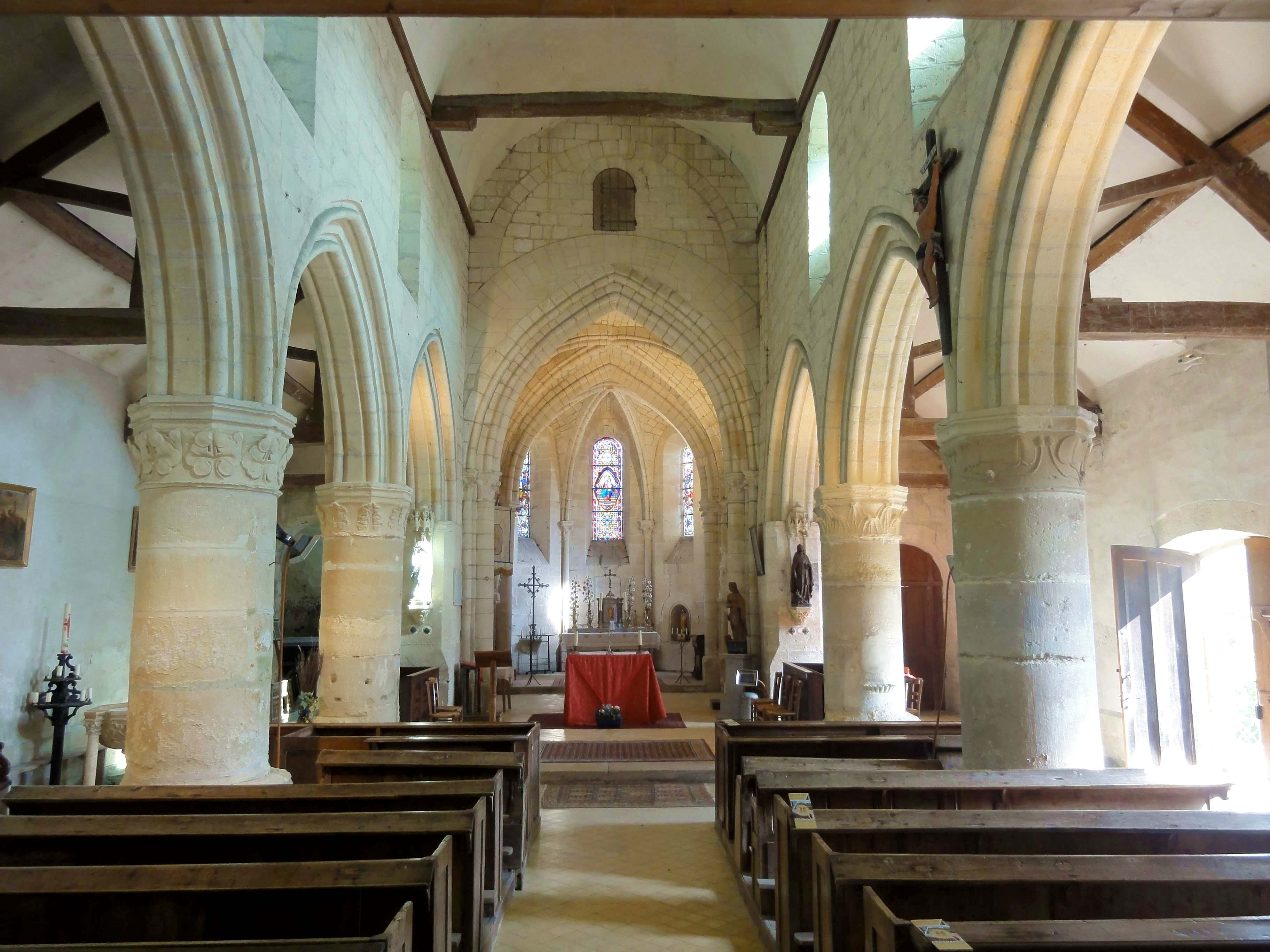 Nef, vue vers l'est.